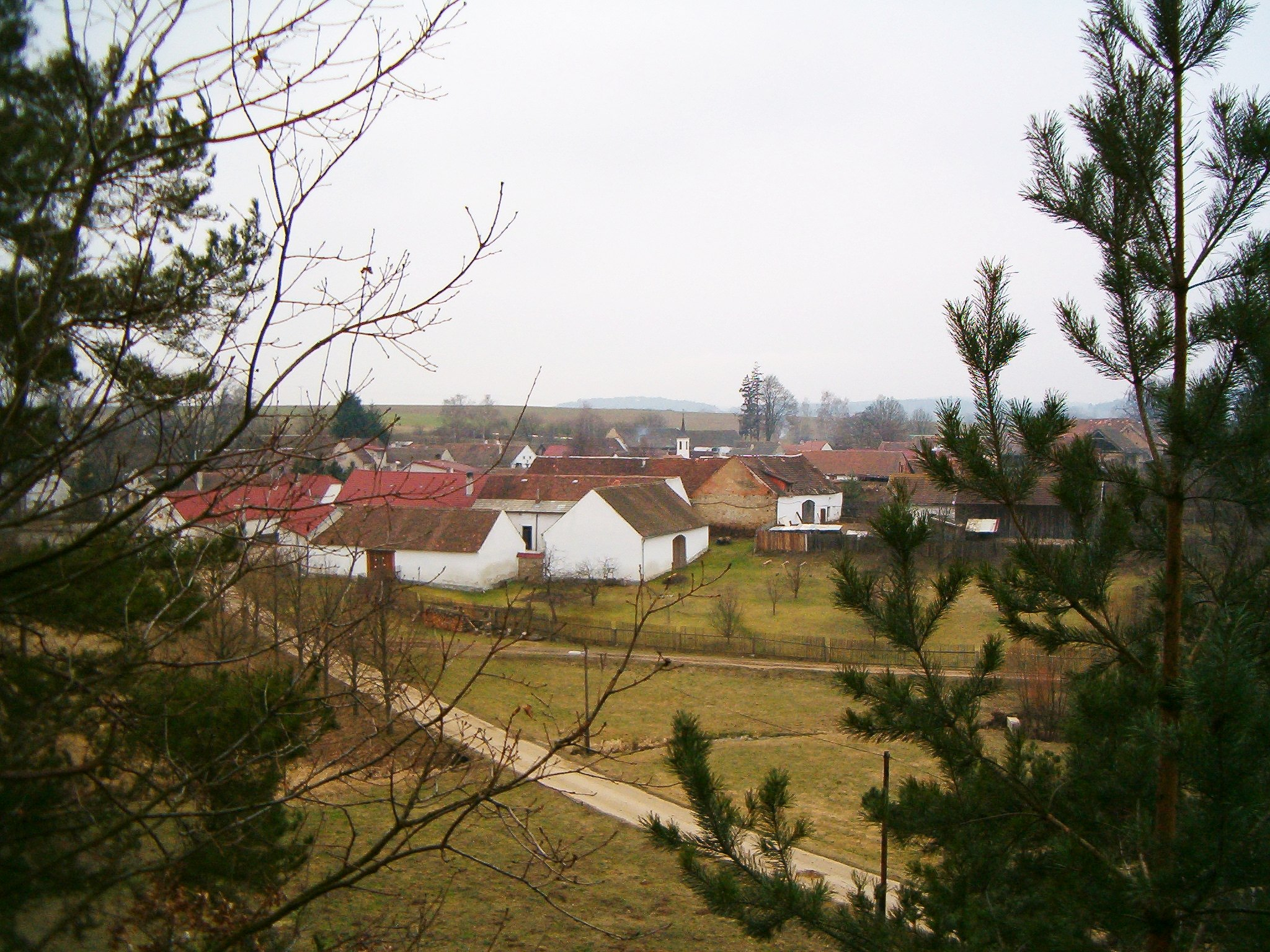 Pohled na vesnici Mutišov od bývalého opevněného hrádku